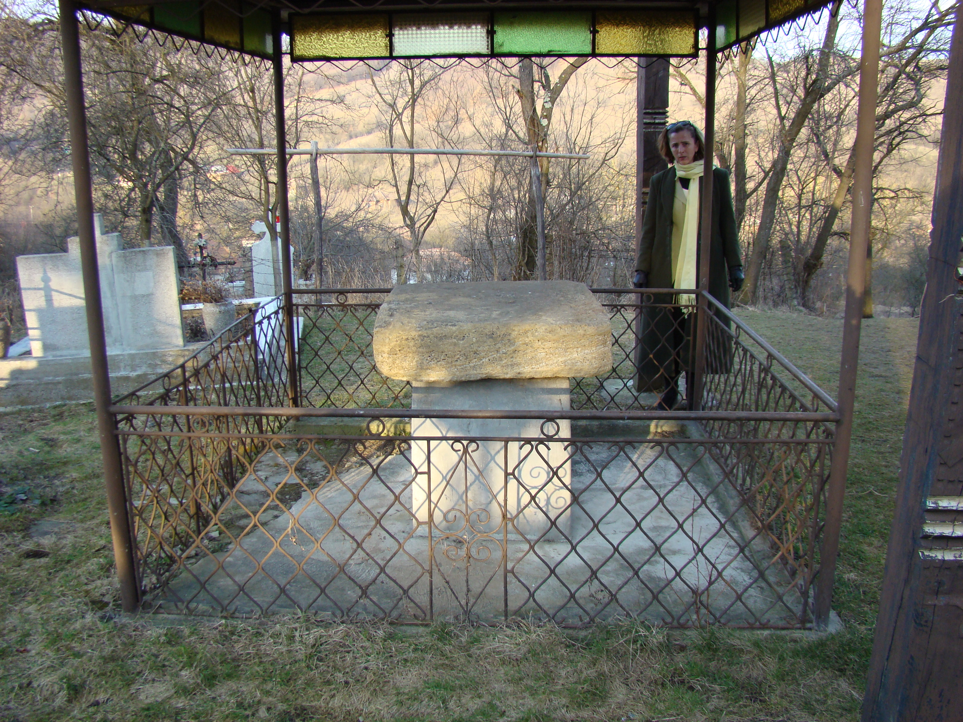 Biserica din Elciu, Cluj